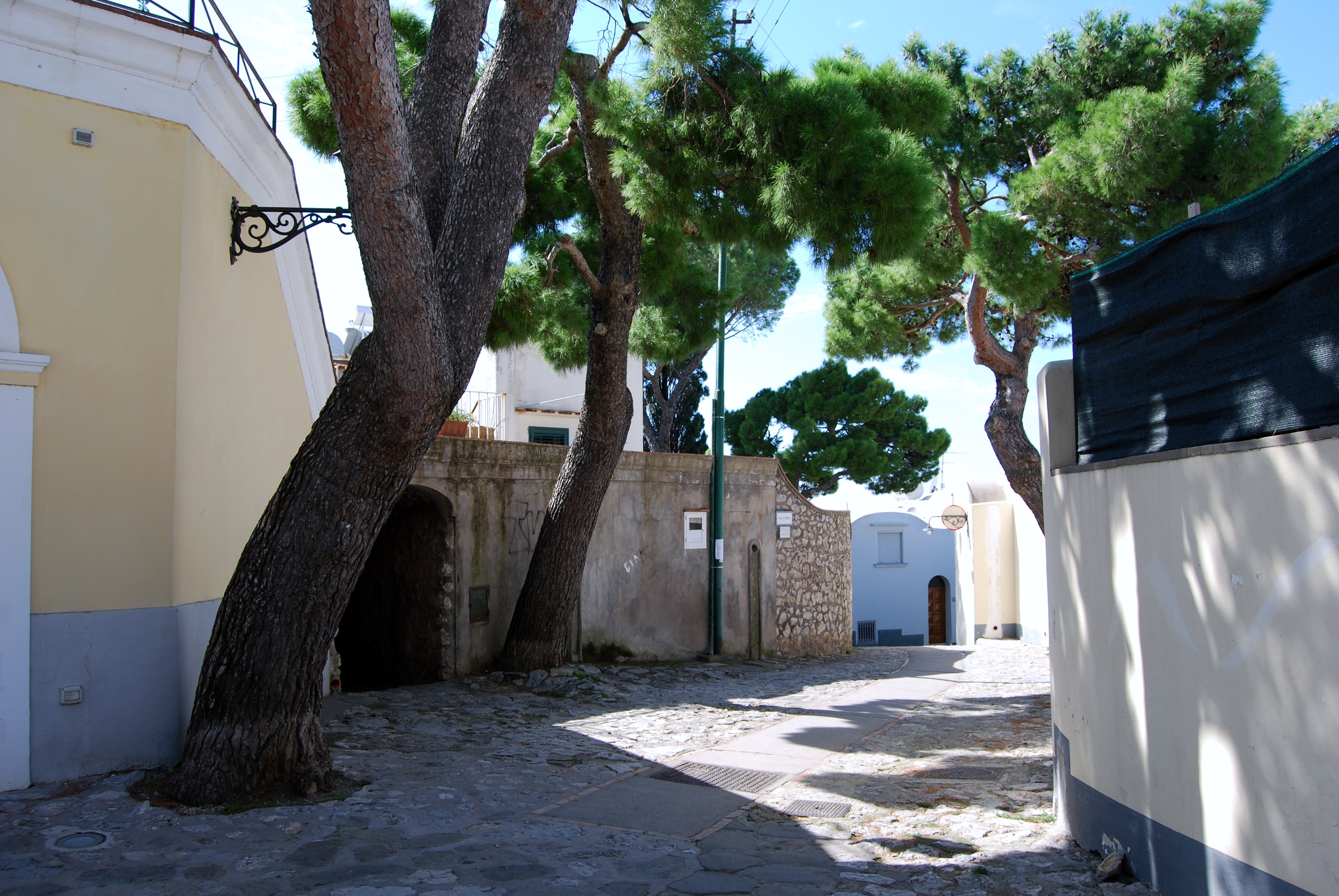 Stradina Anacapri